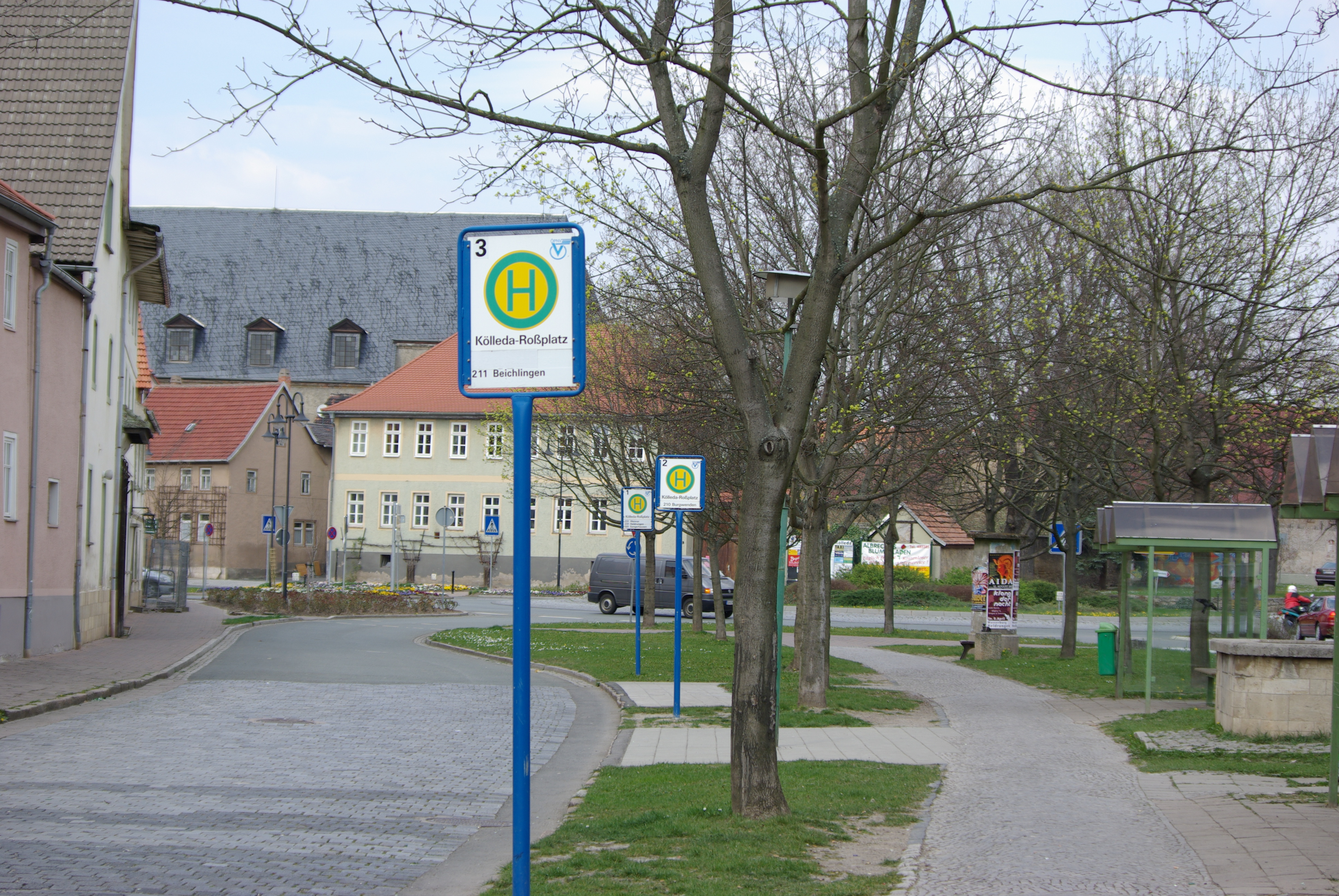 Koelleda, Landkreis Soemmerda, Thueringen, Deutschland